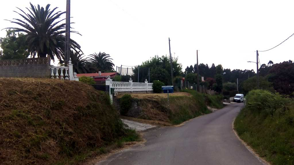 Vista de Campo da Cruz, Sada.